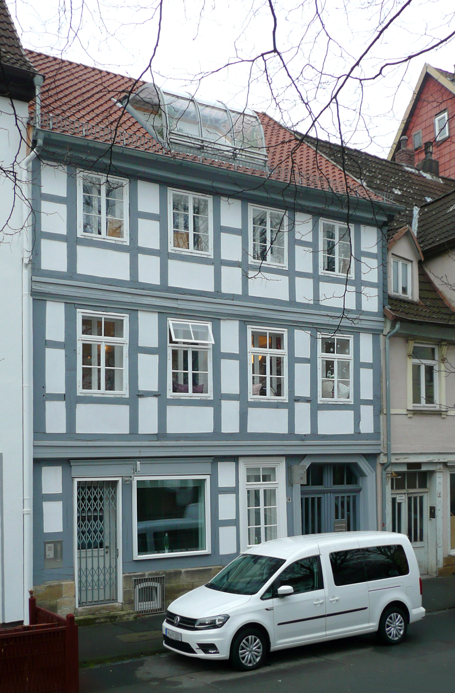 Mittelstr 10 in Hannover, Fachwerkensemble mit Innenhof unter Denkmalschutz, gehört zu den 4 ältesten Fachwerkgebäuden der Stadt Hannover